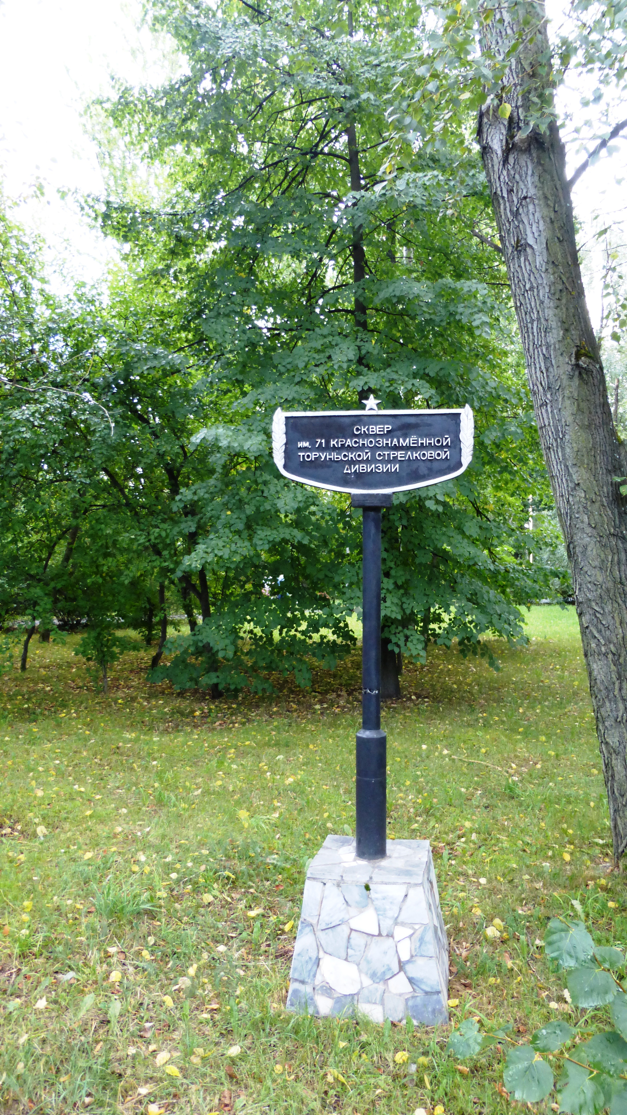 Памятный знак в сквере на углу ул. Гоголя и ул. Энгельса в Петрозаводске.